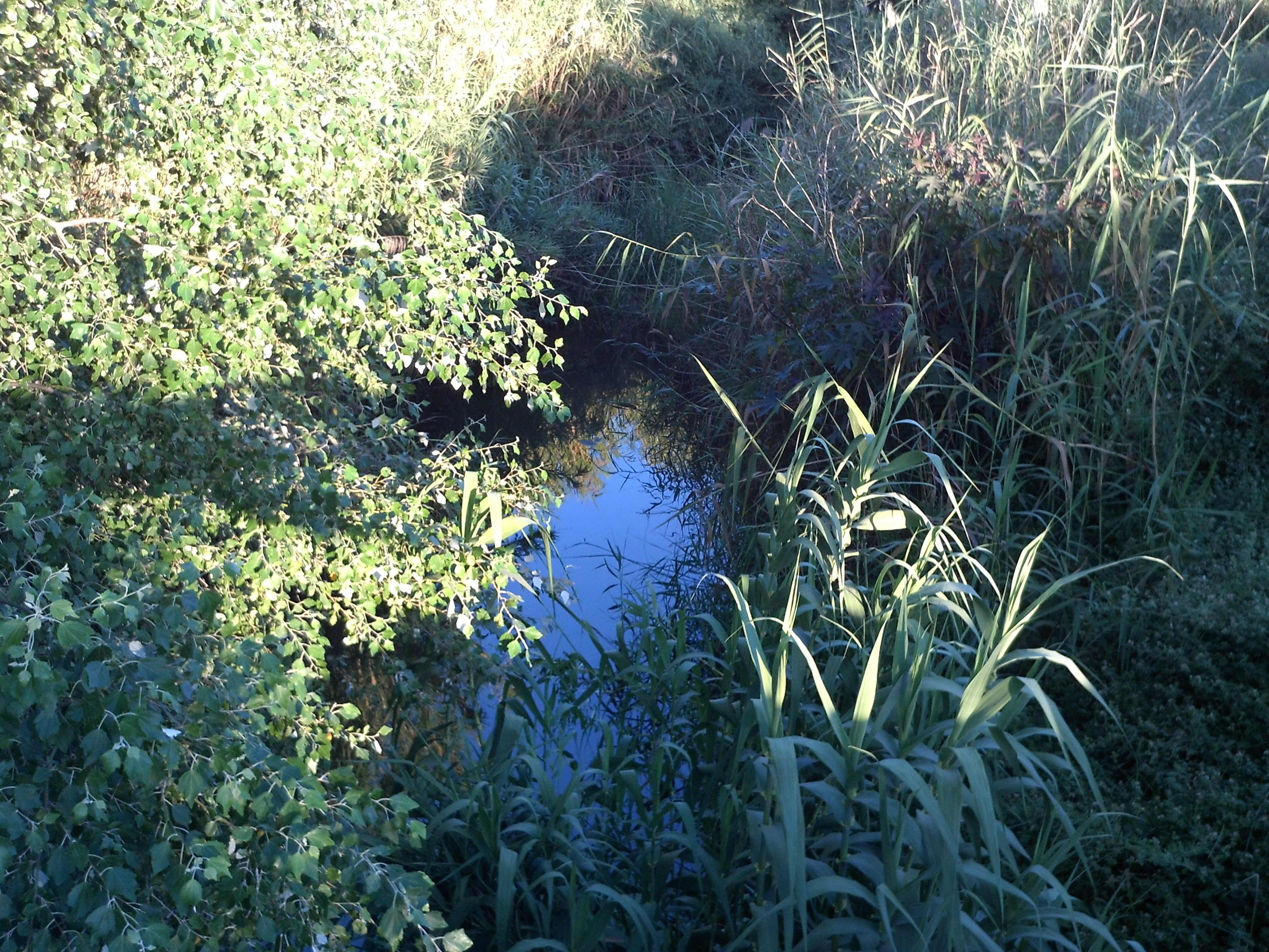 El Riopudio a su paso por Almensilla, provincia de Sevilla, Andalucía, España.